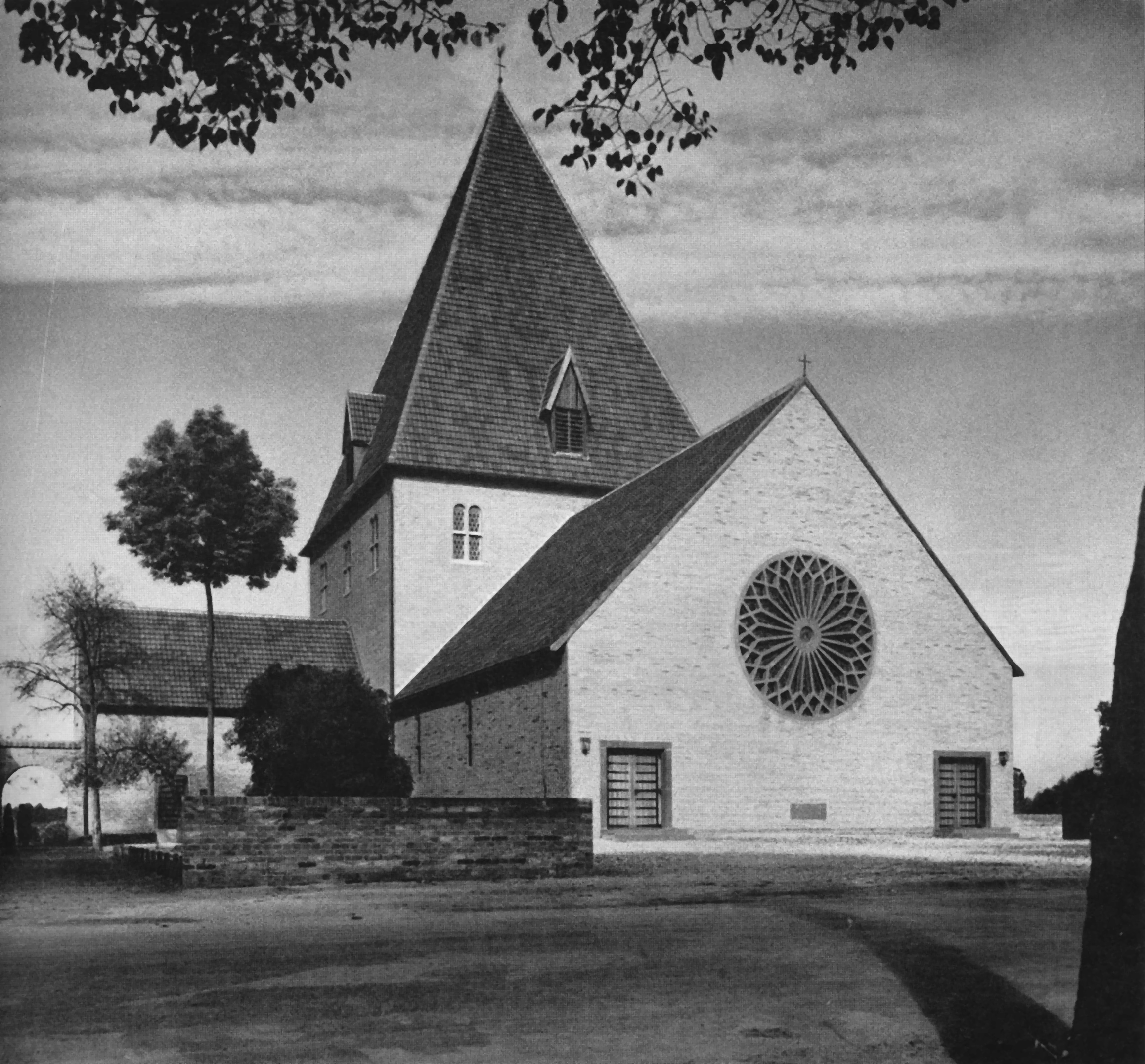 Dorfkirche Ringenberg, Architekt: Dominikus Böhm